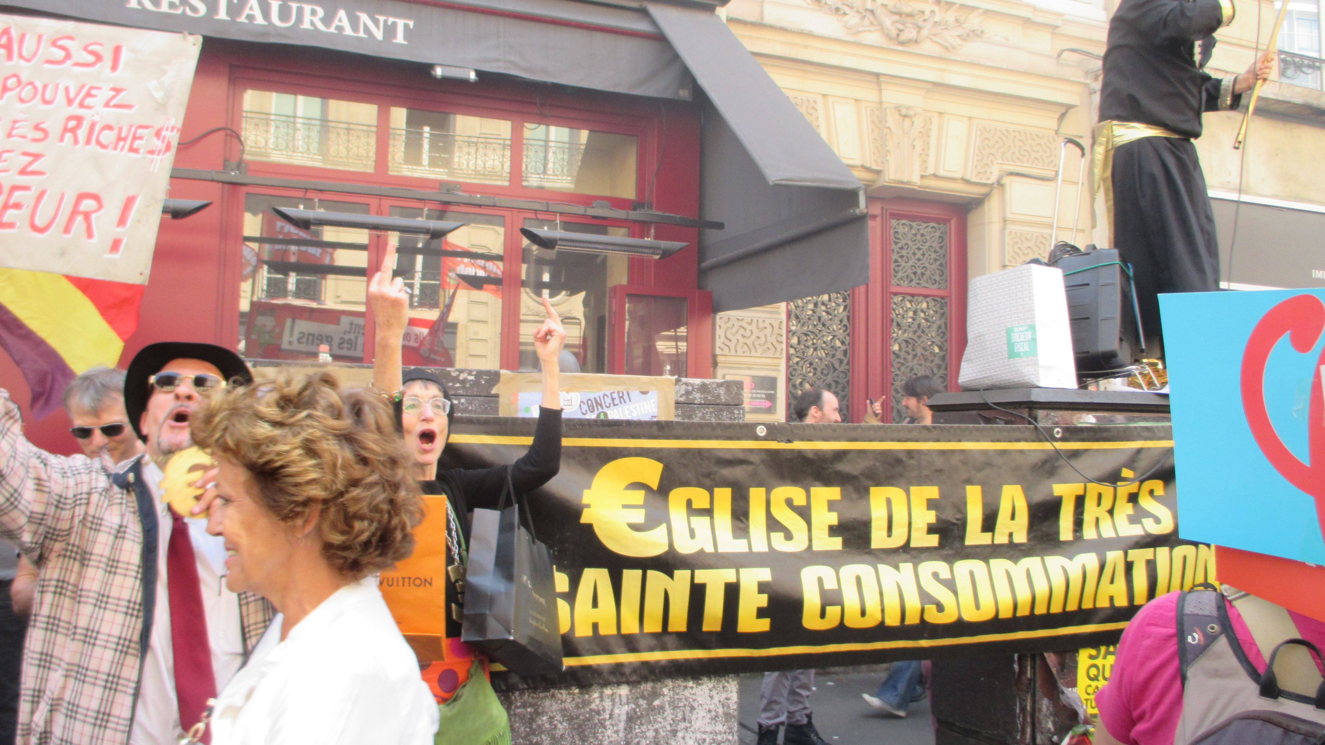 L'Église de la Très Sainte Consommation à la marche du 5 mai 2018, La fête à Macron, parcours d'Opéra à Bastille (Paris, France).